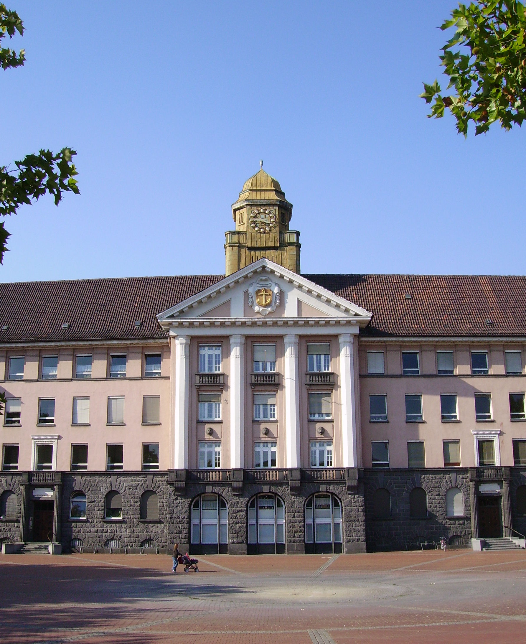 "Stadthaus Nord" of Ludwigshafen in Rheinland-Pfalz (Germany)